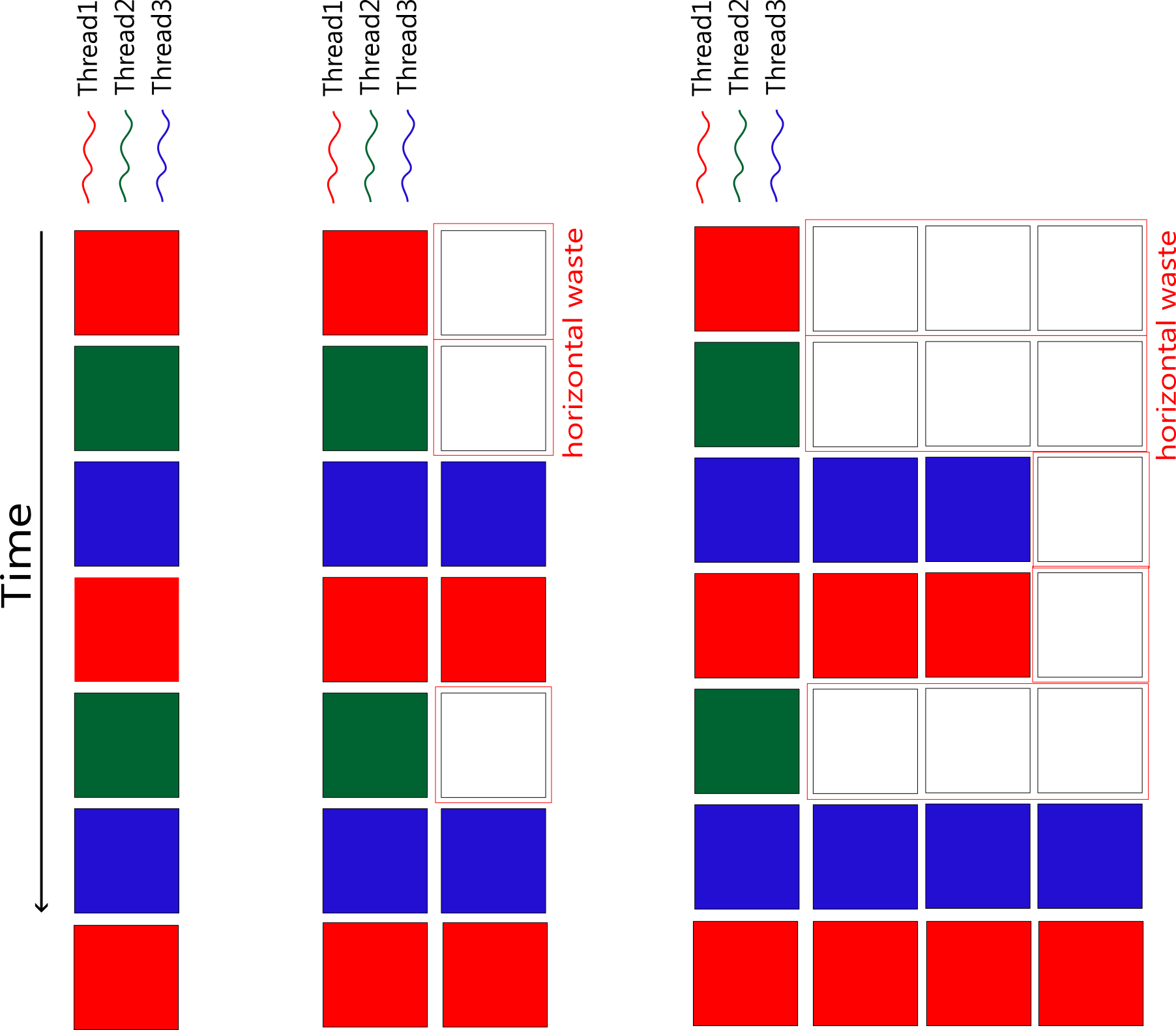 Fine-grained multithreading